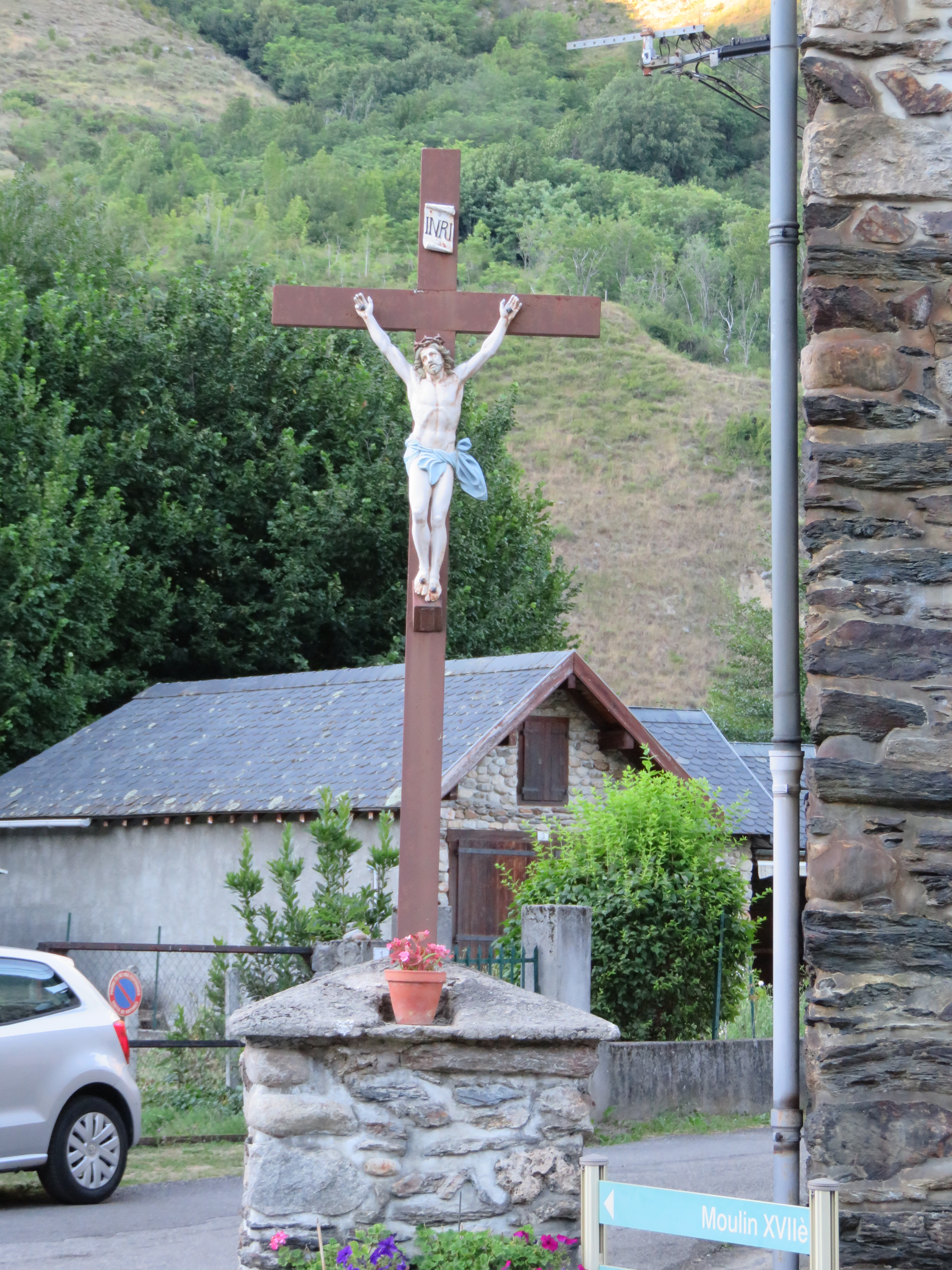 Croix avec un christ à Sinsat.